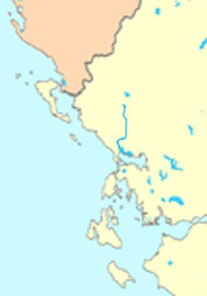 Λούρος